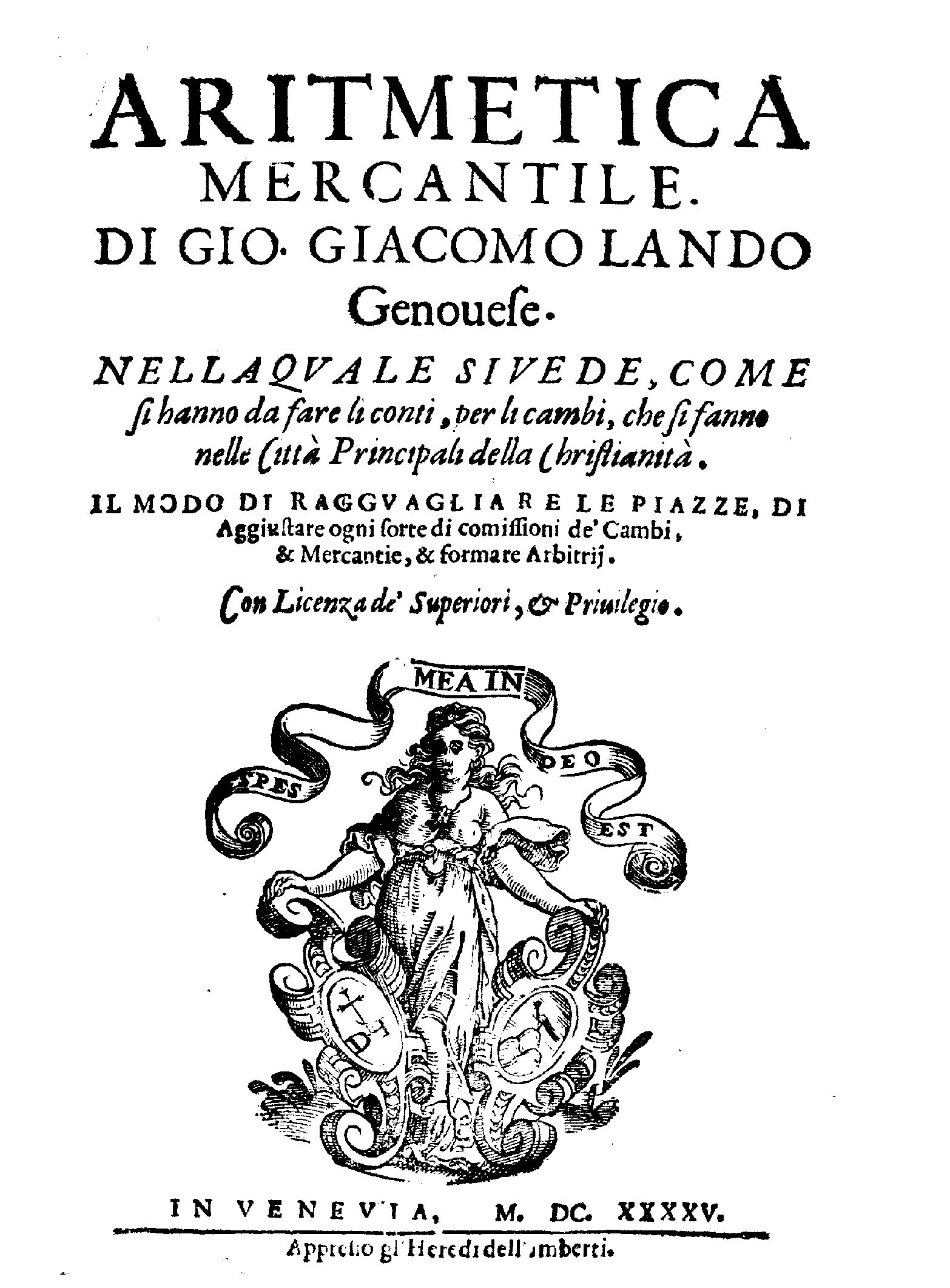 Aritmetica mercantile. Di Gio. Giacomo Lando genouese. Nella quale si vede, come si hanno da fare li conti, per li cambi, che si fanno nelle città principali della christianità. Il modo di ragguagliare le piazze, di aggiustare ogni sorte di comissioni de' cambi, & mercantie, & formare arbitrij. .... - In Veneuia [sic] : appresso gl'heredi dell'Imberti, 1645. - [12], 270, [2] p. ; 4º .